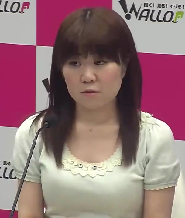 「まるトラっ♪」 7月10日 放送回 (坂本典子)